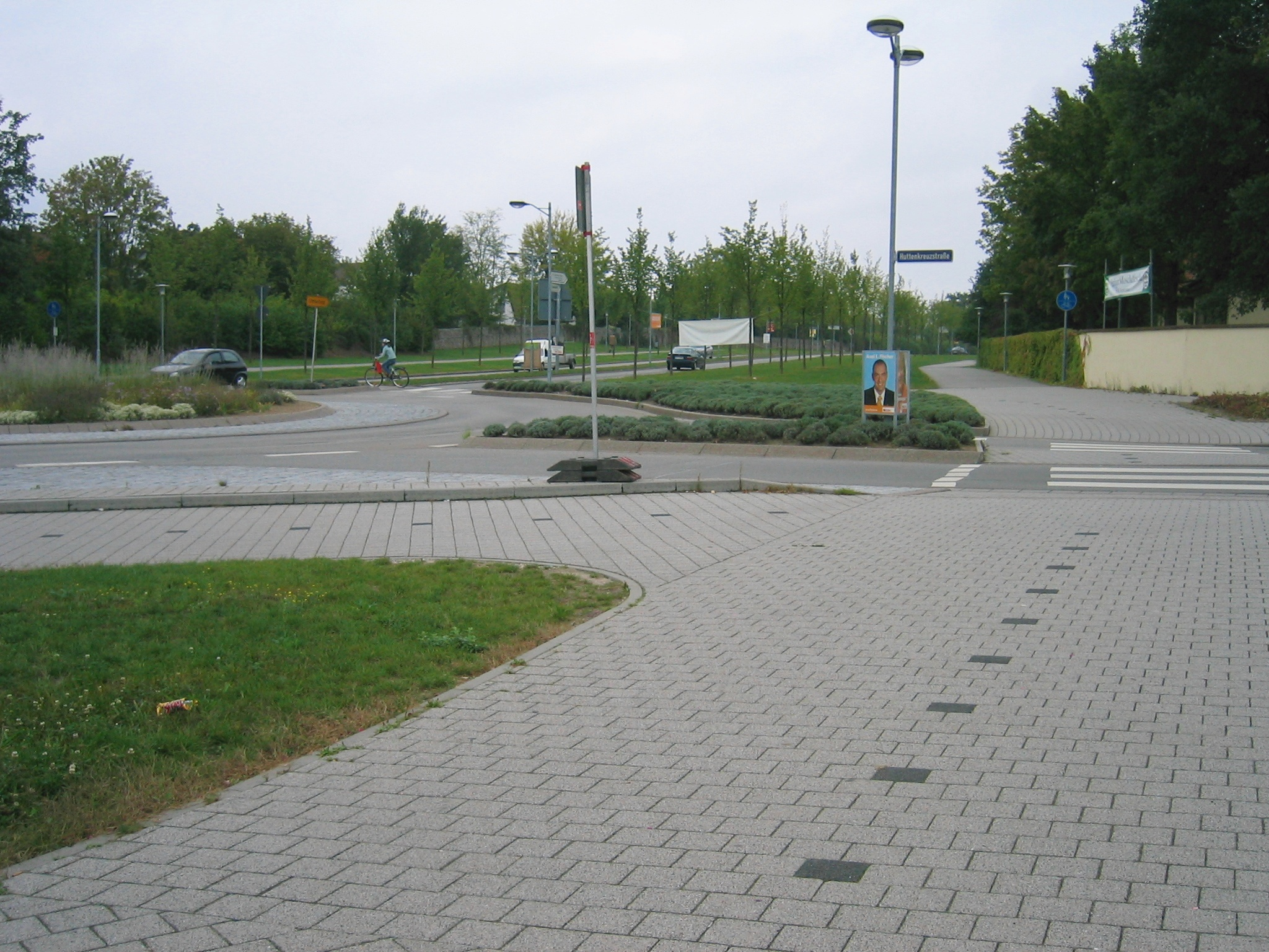 Zebrastreifen im Kreisverkehr, Vorrechte für Radler